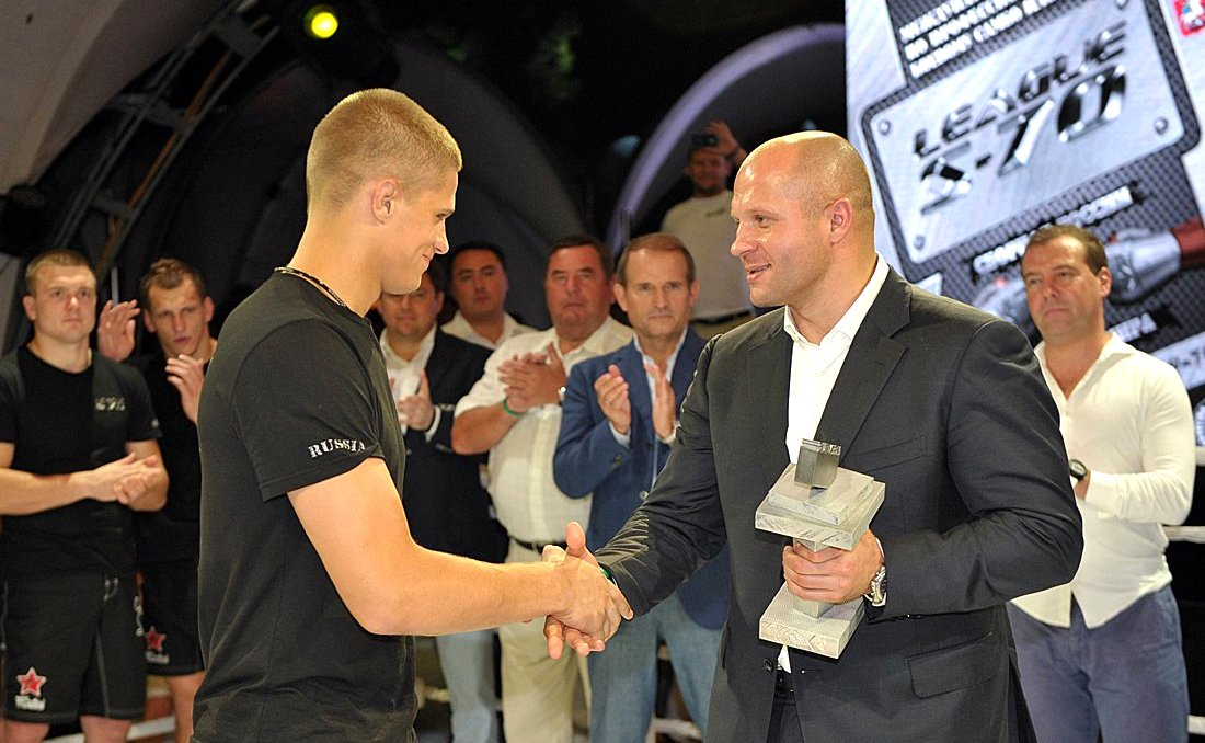 Михаил Мохнаткин и Фёдор Емельяненко на турнире Платформа S-70 2013 года